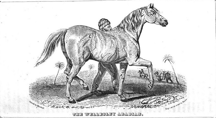 Le Wellesley Arabian, d'après une peinture de ̥M. Marshal gravée sur bois par Butler, 1830.